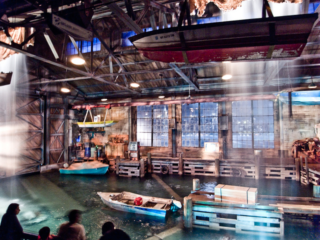 R0012135